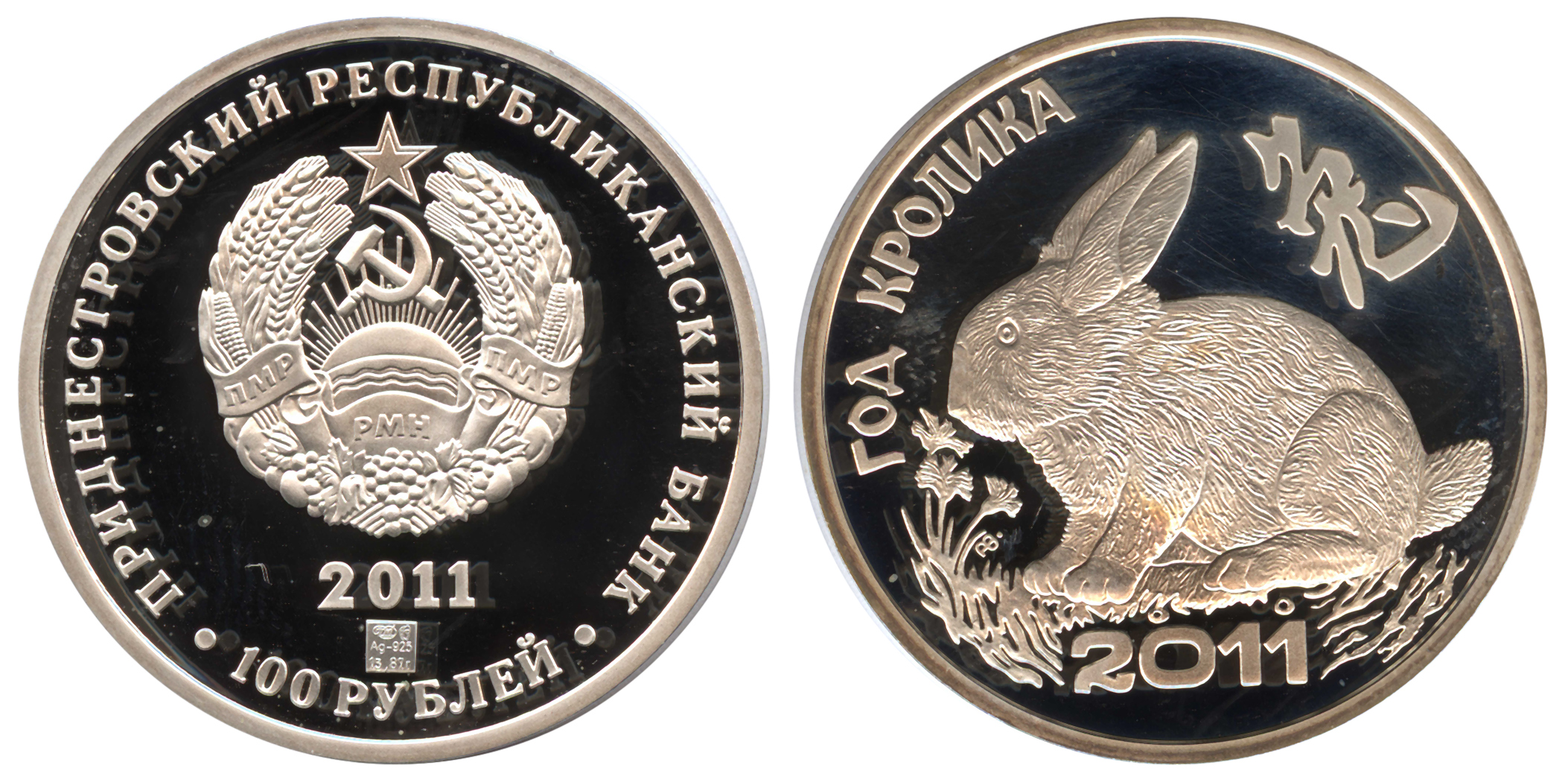 Gedenkmünze 100 Rubel Pridnestrowien Jahr des Kaninchen aus der Reihe "Chinesisches Horoskop" Polierte Platte Durchmesser 32 mm Masse 13,87 g 925er Silber Auflage: 300 Stück